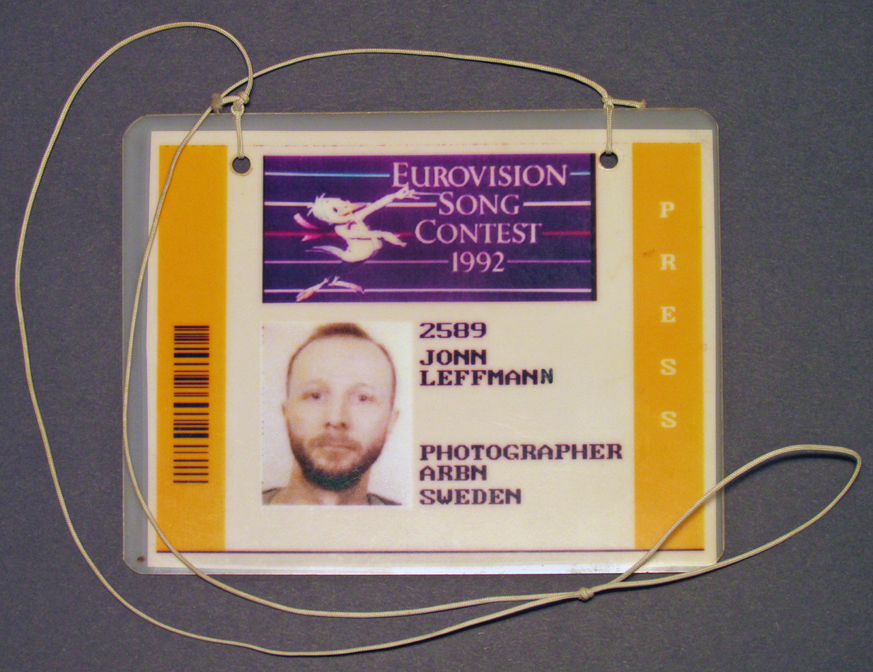 Ackrediteringskort till Melodifestivalen i Malmö 1992.